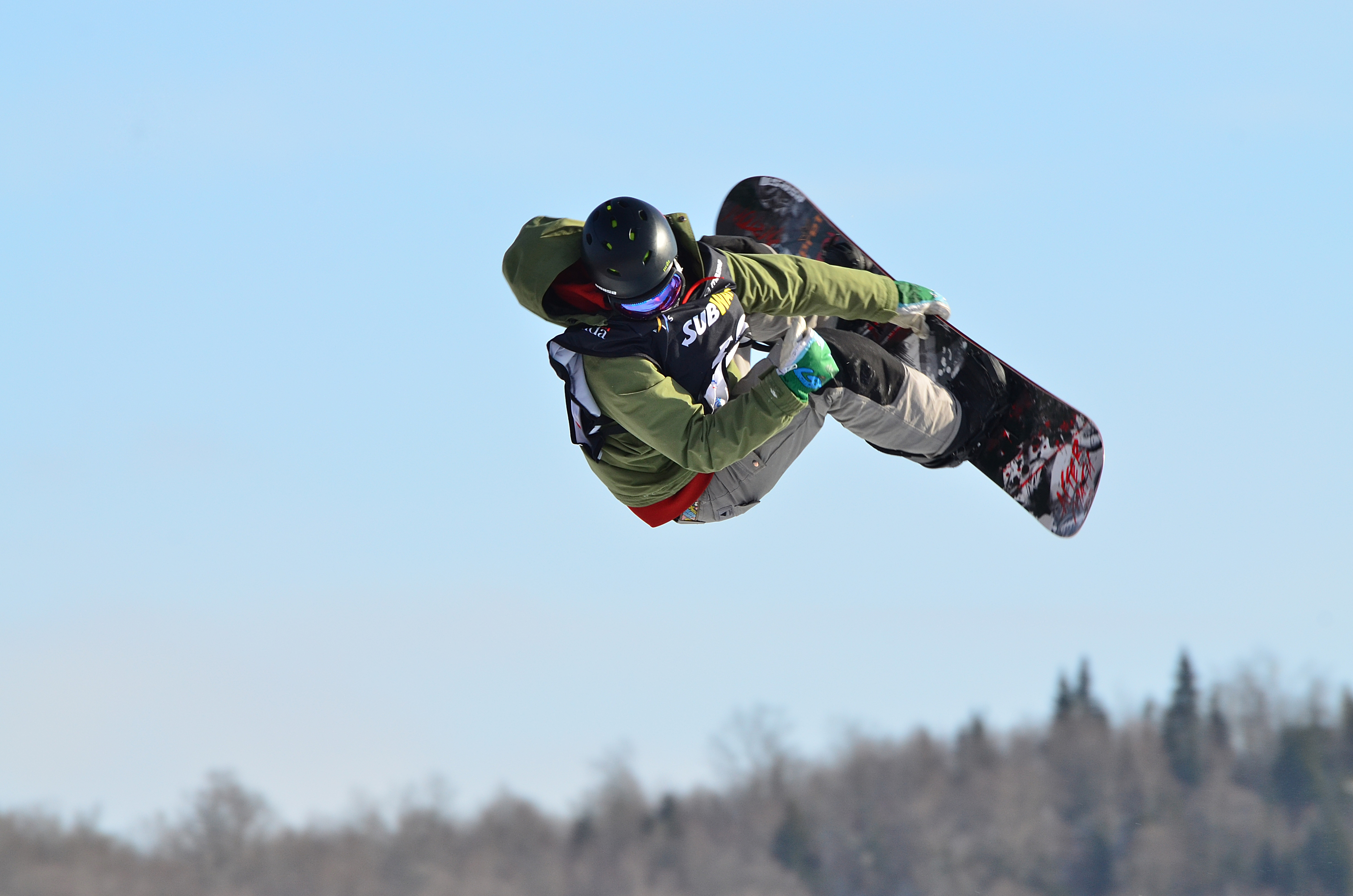 Un planchiste réalise un saut lors de l'épreuve de slopestyle des championnats du monde de surf des neiges à Québec en 2013.